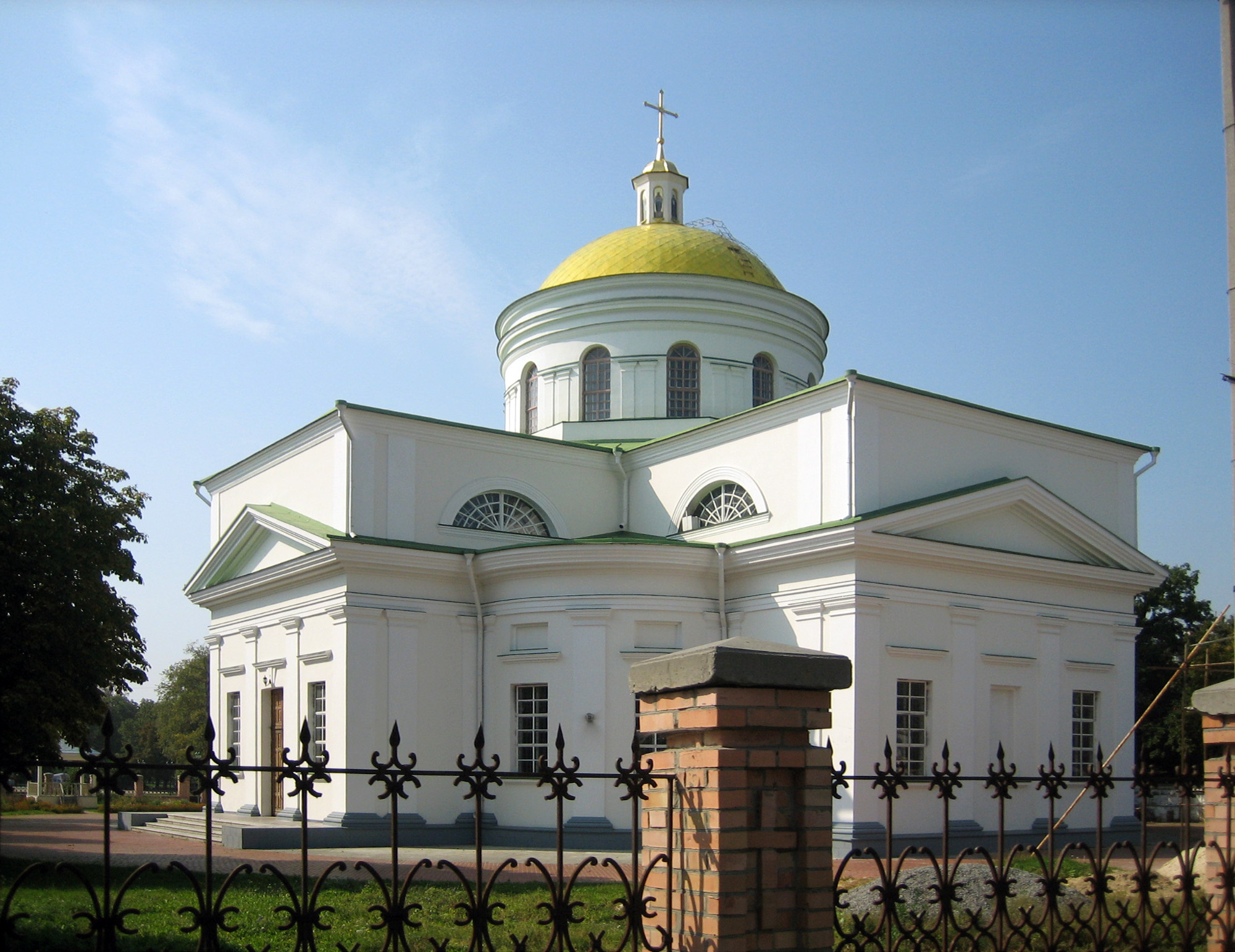 Кафедральный собор Спаса Преображения - Белая Церковь - Белоцерковский район - Украина, Киевская область